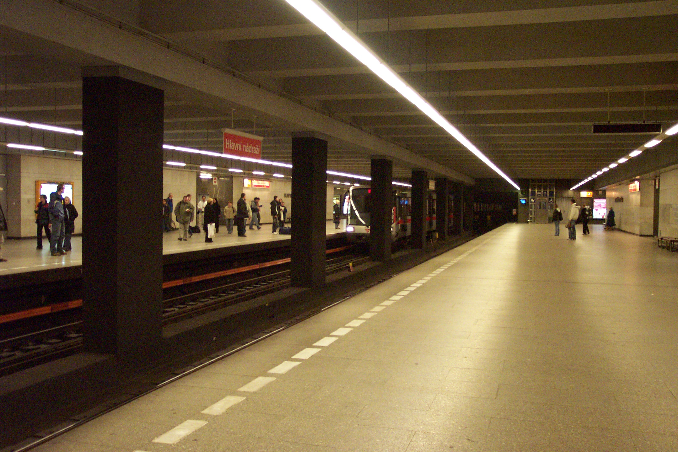 Metro station Hlavní nádraží in Prague - Stanice Hlavní nádraží metra v Praze